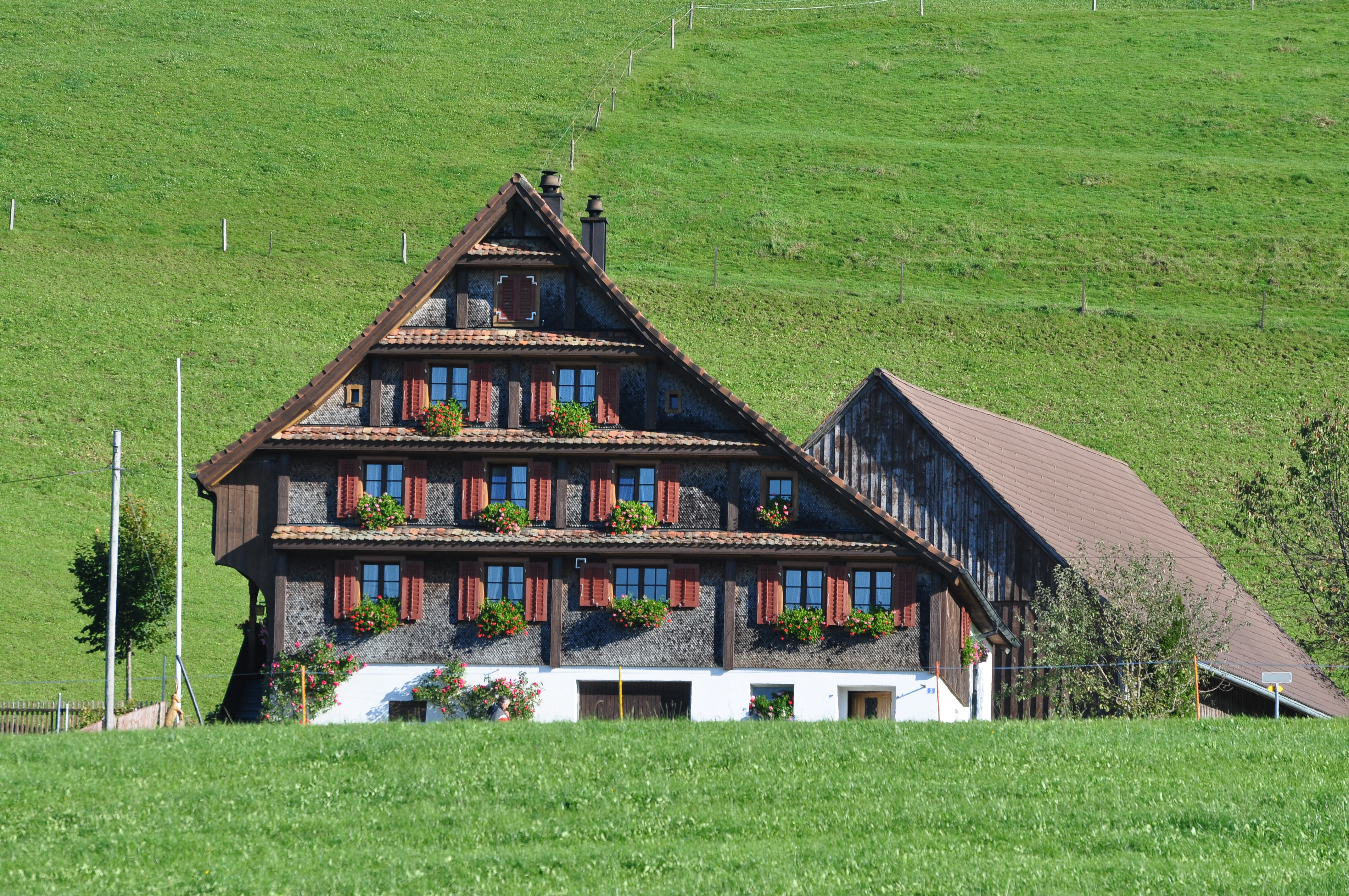 Feusisberg towards Etzel mountain (Switzerland)